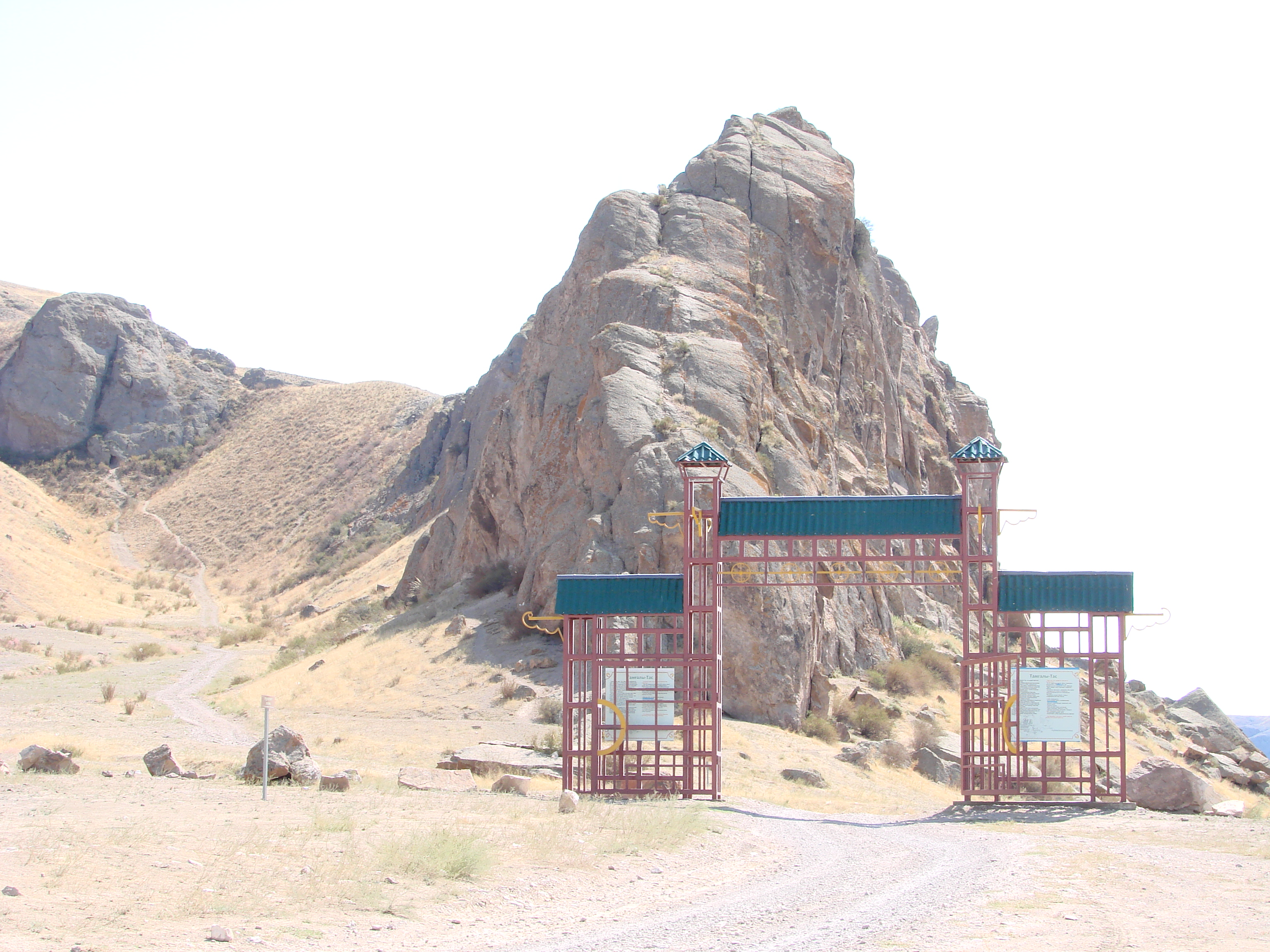 Буддийский храм, Казахстан, Алма-Атинская область